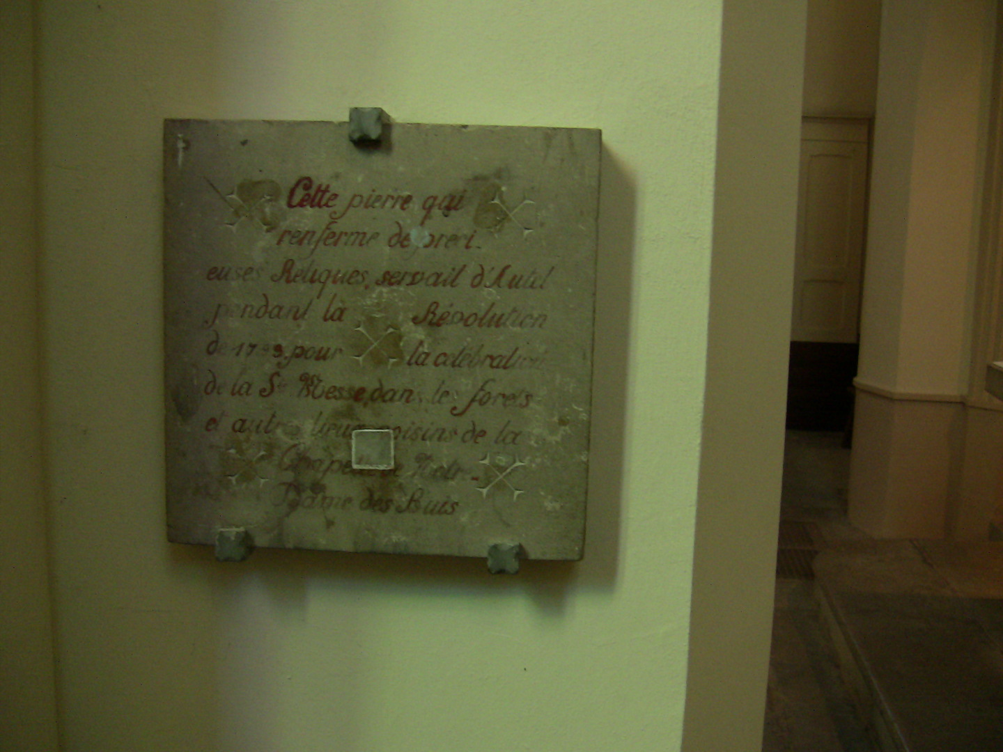 Plaque située à l'intérieur de Notre-Dame des Buis à Besançon (Doubs, France).